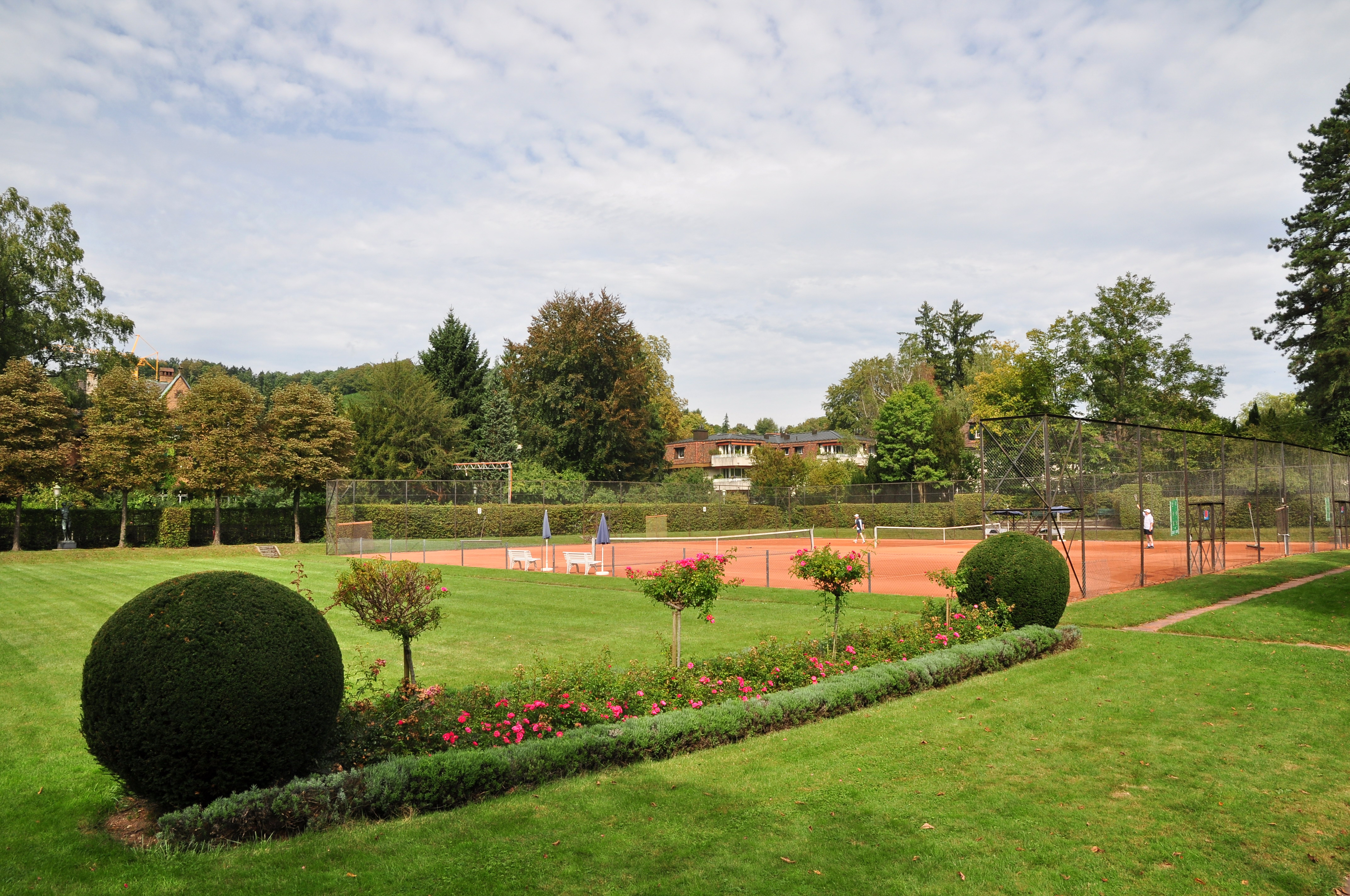 Tennisanlage Geiselweid, Pflanzschulstrasse 36 in Winterthur (Switzerland)